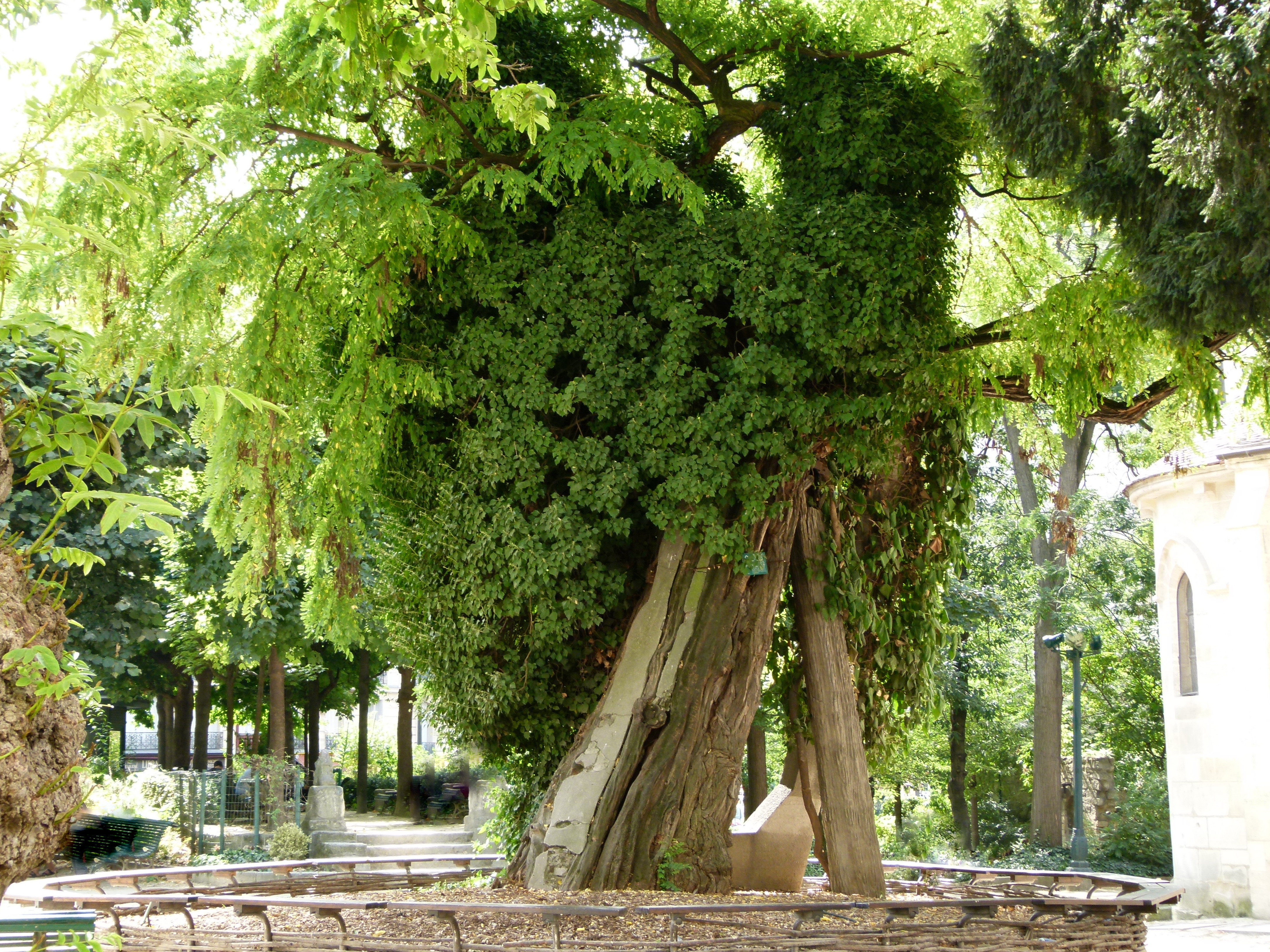 Le plus vieil arbre de Paris. Le Robinier du Square Viviani planté en 1601.